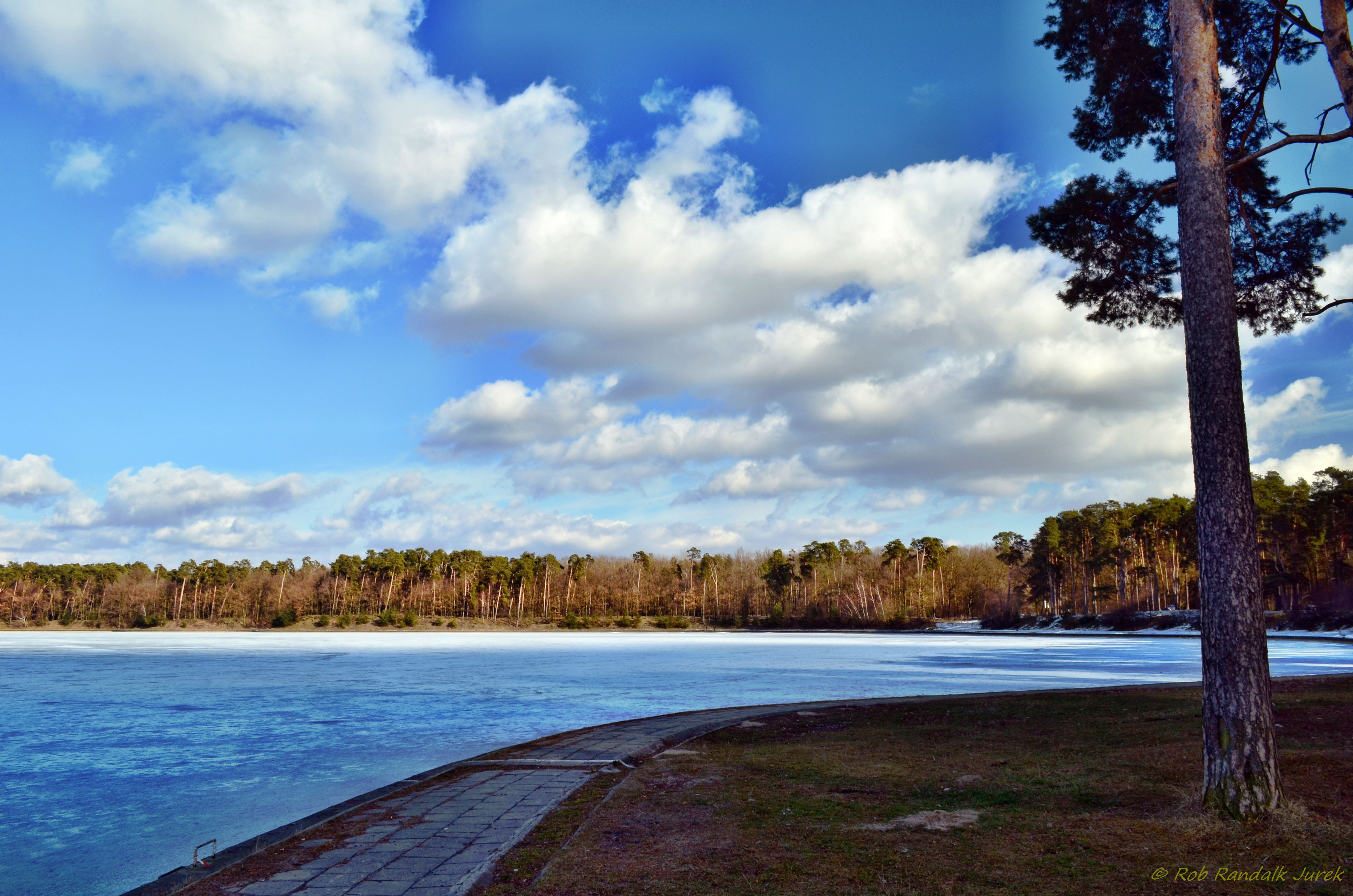 Zalew Zemborzycki